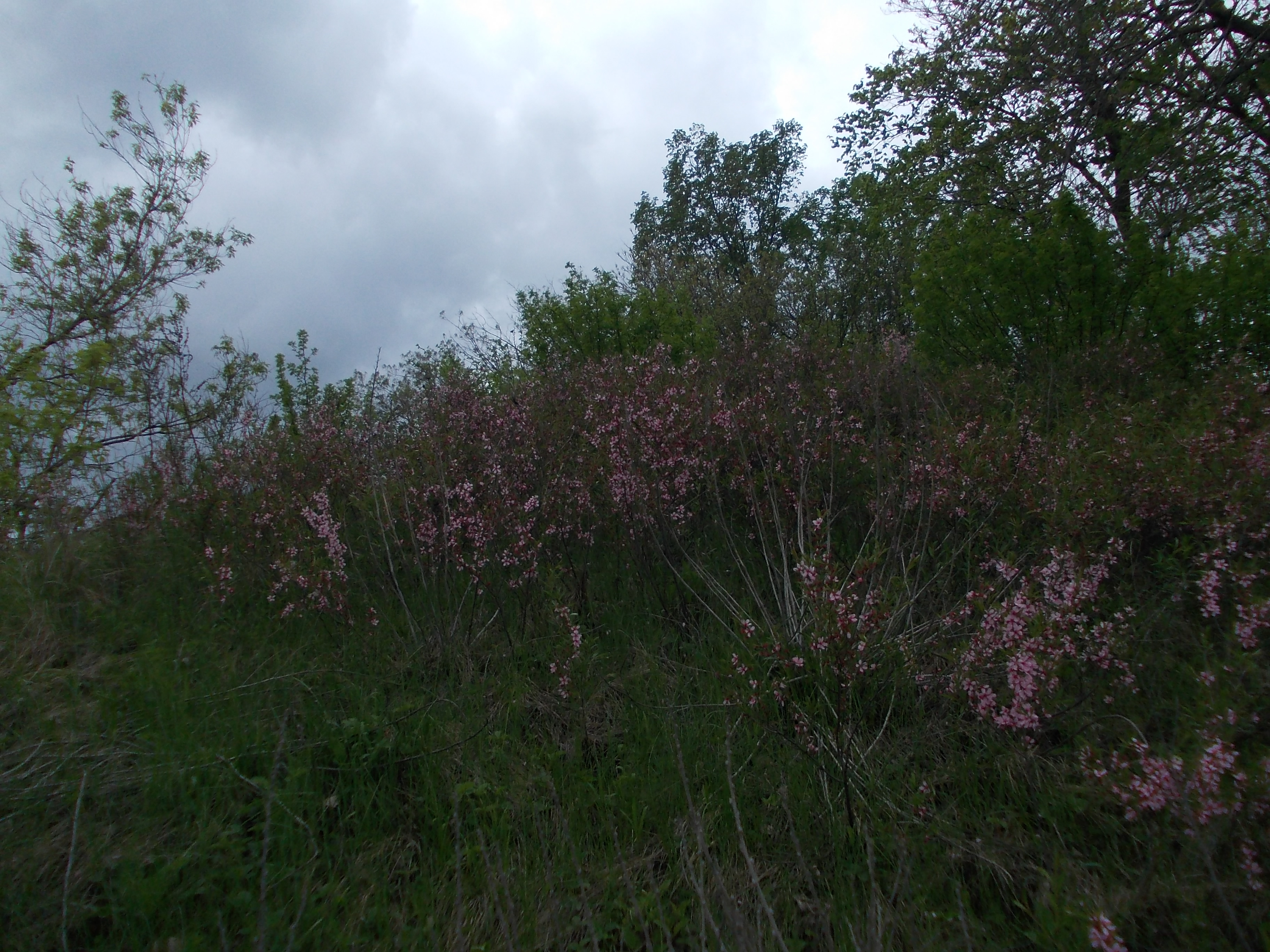 Заросли степной вишни: Стерлибашевский район, Башкортостан This image is related to the protected area of Russia number 0210203